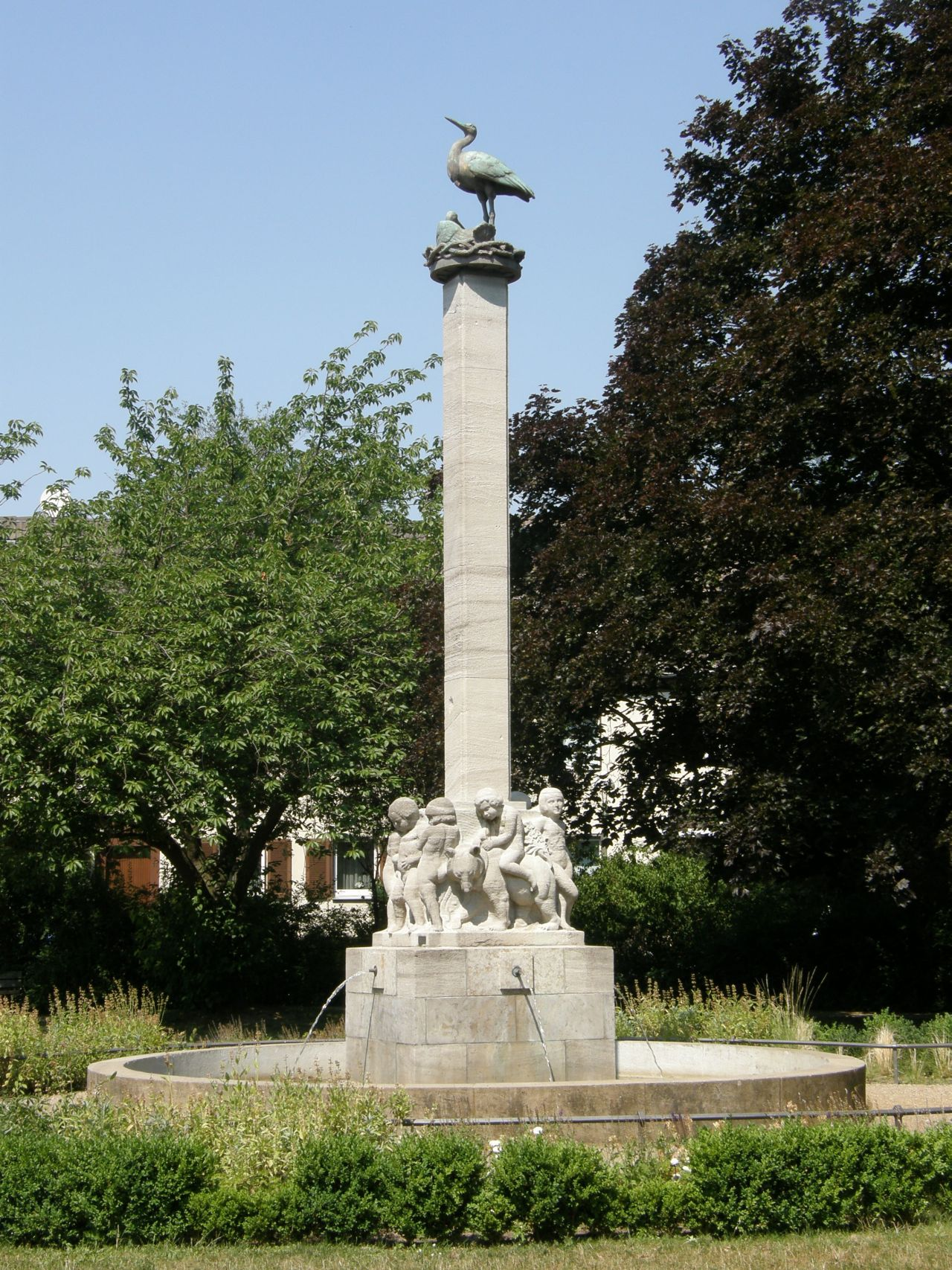 Ernst Seger: Storchenbrunnen. 1931 (Sanierung 1987), Muschelkalk, Bronze (vergoldet), Adolf-Scheidt-Platz, Berlin-Tempelhof